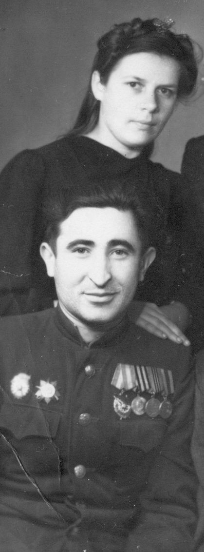 Міхаіл Шаіпаў і яго жонка Алена Шаіпава